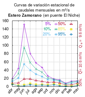 Curvas de variación estacional del estero Zamorano en el puente Niche. # Dirección General de Aguas # Diagnóstico y clasificación de los cursos y cuerpos de agua según objetivos de calidad. Cuenca del río Rapel. # Santiago de Chile # Ministerio de Obras Públicas (Chile) # 2004 # url: # urlarchivo: # Tabla 4.5: Estero Zamorano en puente El Niche pág.59 mes 5% 10% 20% 50% 85% 95% abr 19.534 15.847 12.510 8.467 5.934 5.130 may 44.559 31.271 20.363 8.970 3.268 1.806 jun 150.861 95.179 54.292 18.156 4.138 1.336 jul 80.653 58.379 39.467 18.676 7.431 4.324 ago 57.707 43.046 29.964 14.451 5.045 2.148 sep 46.710 34.963 24.617 12.590 5.512 3.393 oct 25.709 21.455 17.019 10.322 4.499 1.993 nov 18.546 16.954 15.025 11.339 6.798 4.131 dic 16.088 14.496 12.568 8.884 4.346 1.680 ene 8.114 6.797 5.432 3.388 1.634 0.887 feb 13.131 10.823 8.416 4.785 1.630 0.272 mar 14.229 12.655 10.862 7.756 4.445 2.733 This plot was created with Gnuplot.